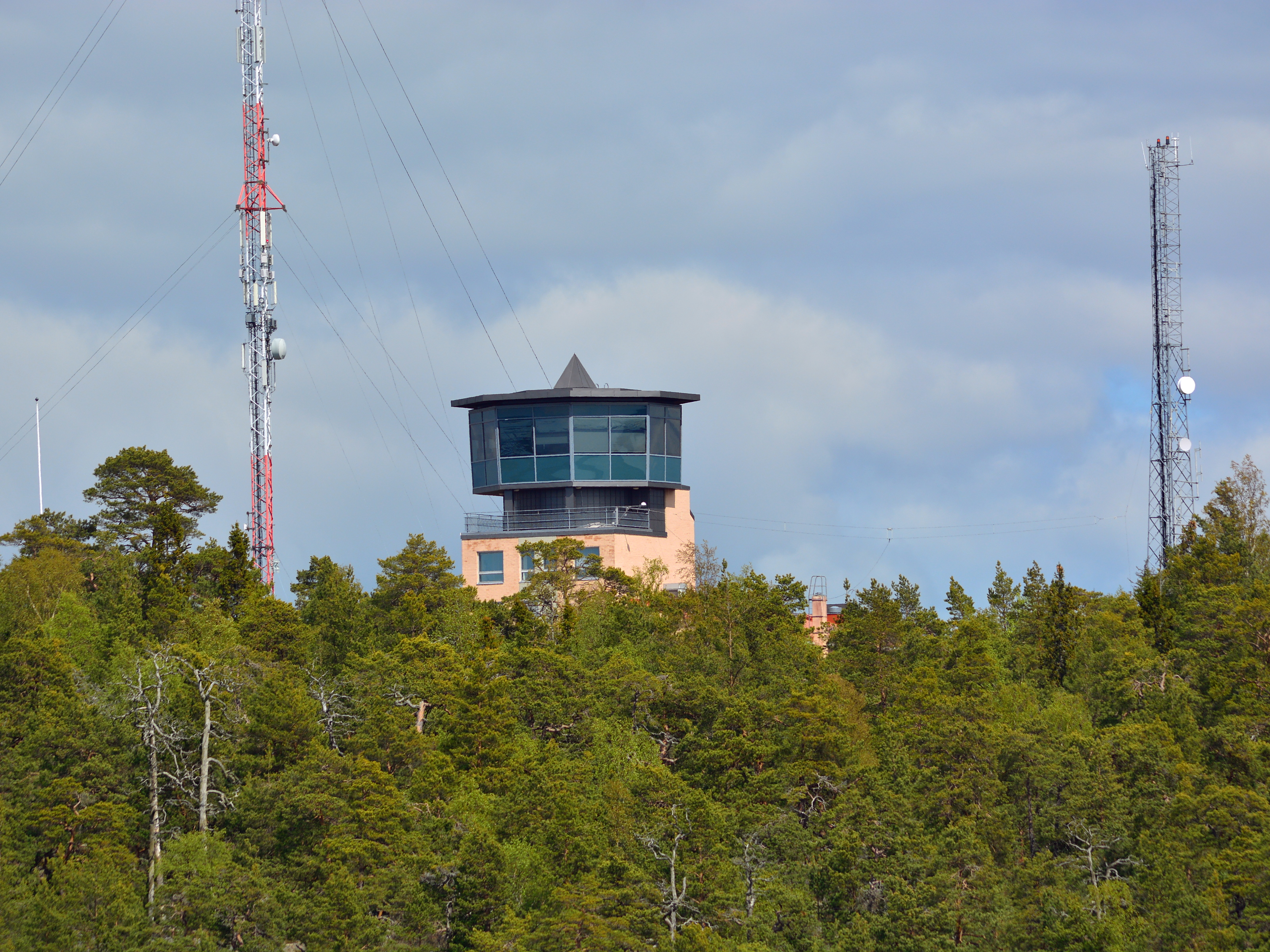 Sjöbevakningsstationen på Lotsberget i Mariehamn, Åland.